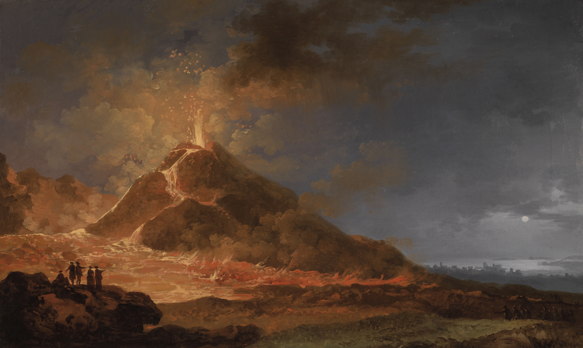 Ausbruch des Vesuvs, am 14. Mai 1771, Kunsthalle Karlsruhe